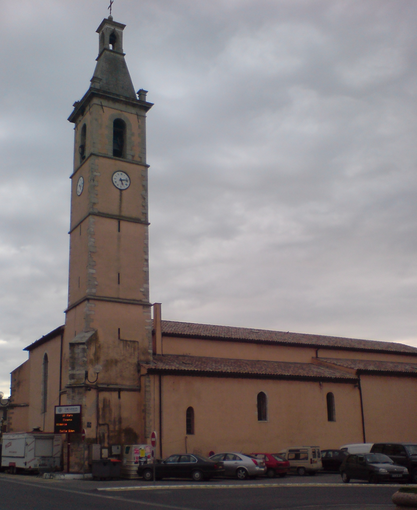 Information Église d?Oraison (Alpes-de-Haute-Provence)) Date : voir métadonnées